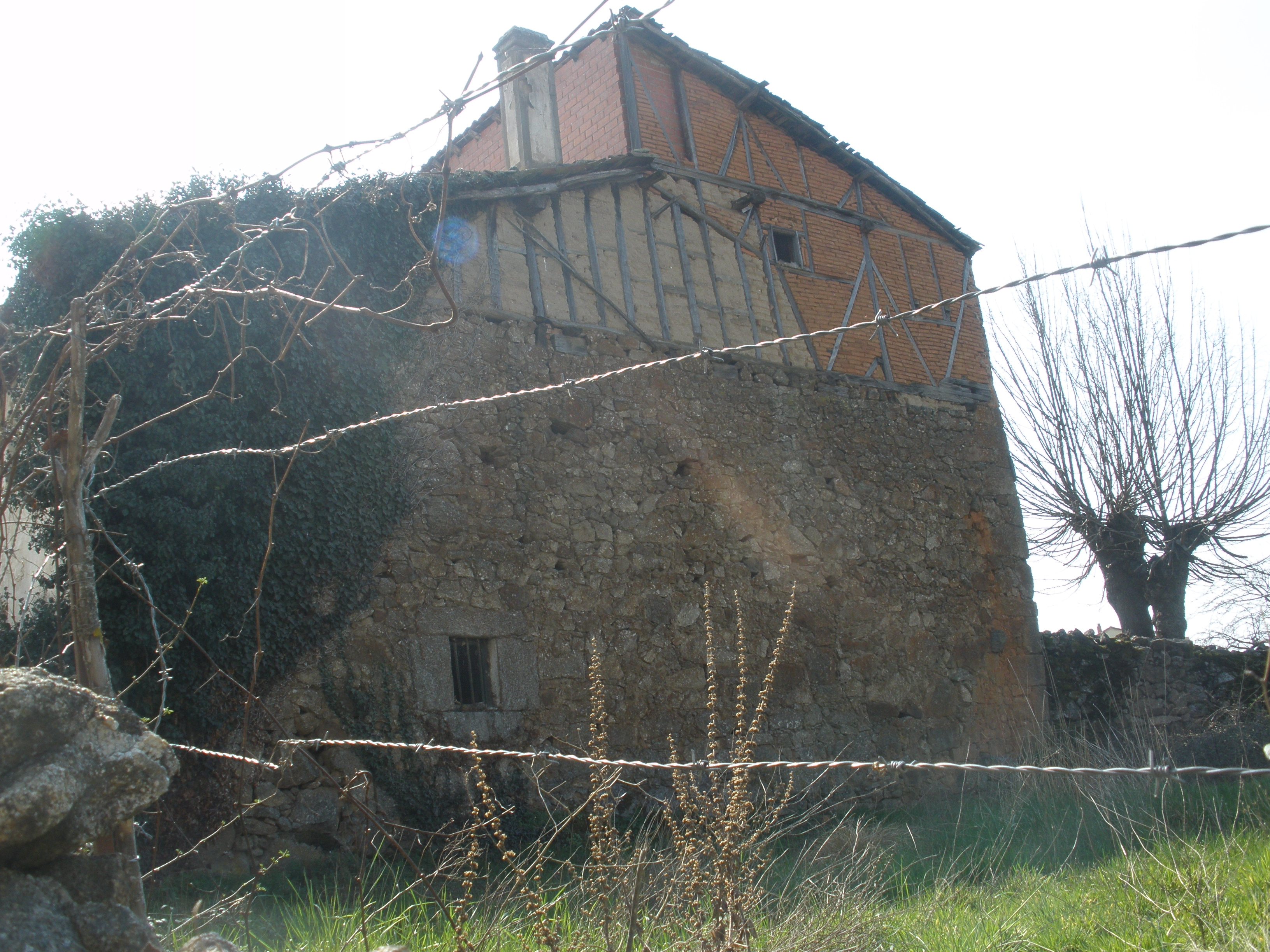 La mayoría de las viviendas antiguas están siendo remodeladas o substituidas por otras nuevas.